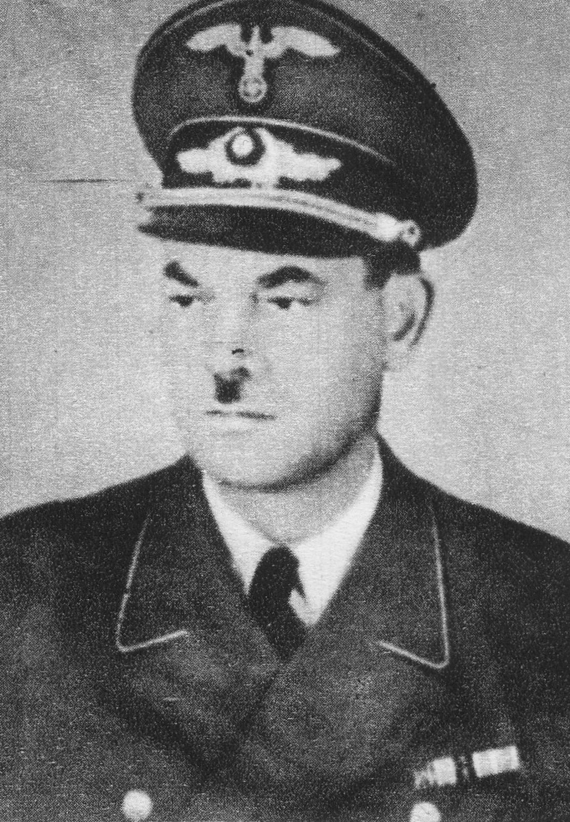 Gubernator dystryktu radomskiego Ernst Kundt